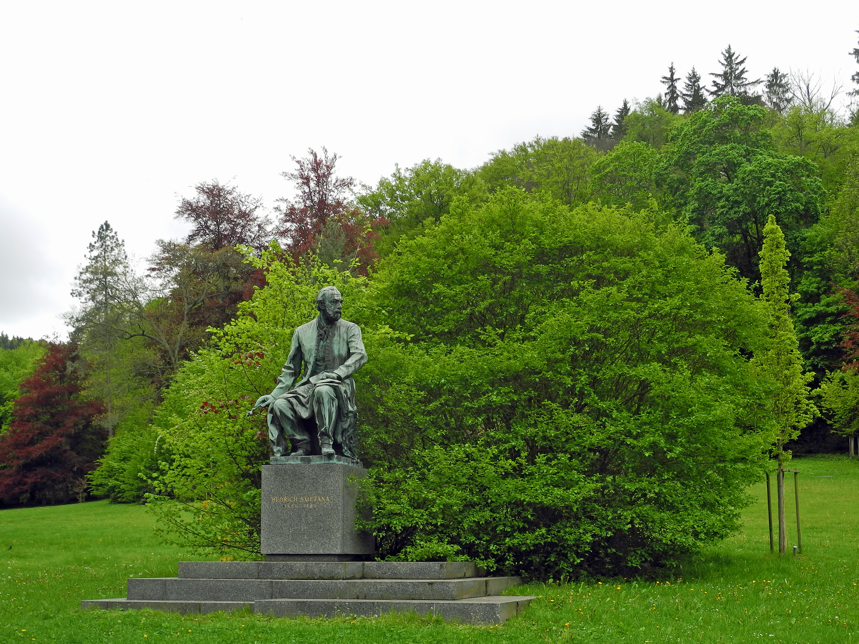 Smetana-Denkmal in Karlsbad - Karlovy Vary